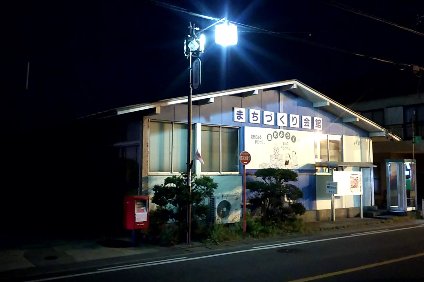 愛知県額田郡幸田町にある幸田まちづくり会館。幸田町国際交流協会が入っている。1977年から1996年には幸田町立文庫が入っており、その前は郵便局の局舎だった。